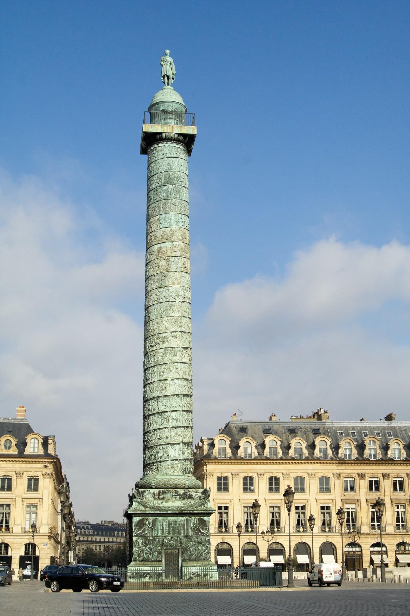 Colonne Vendôme à Paris